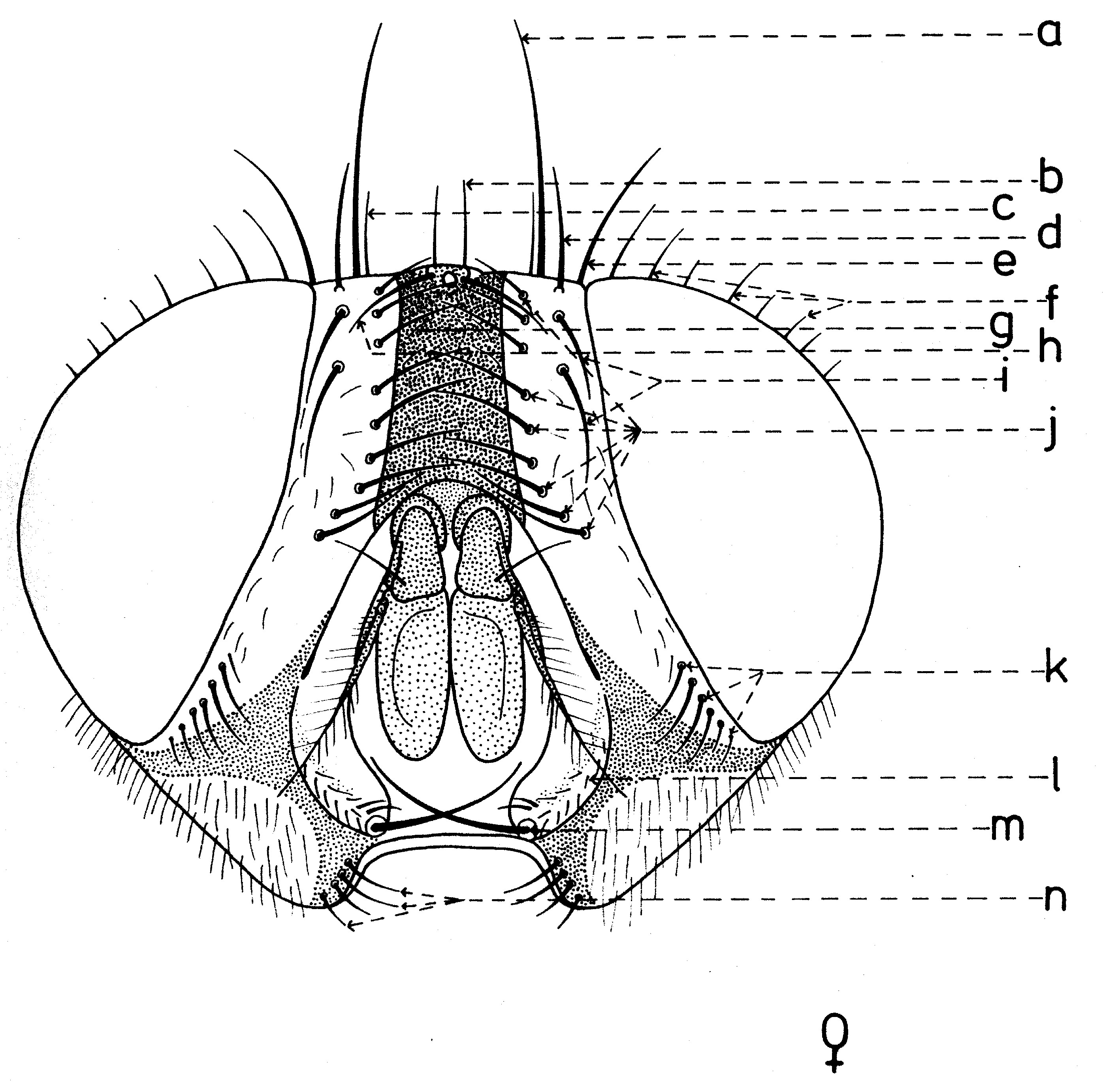 hétotaxie de la tete de la femelle